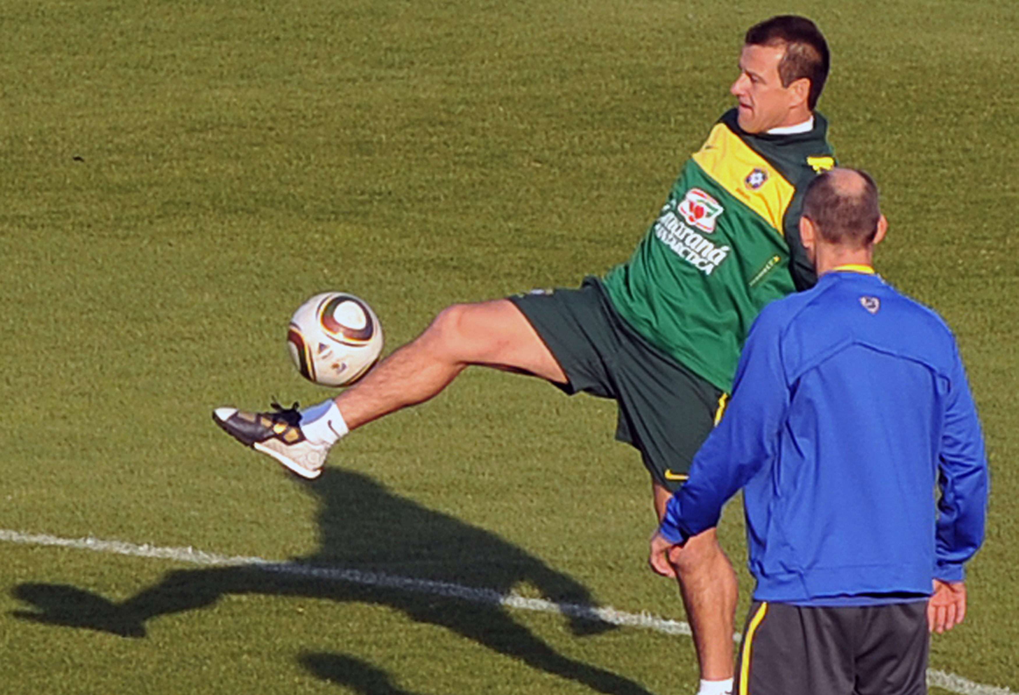 Soweto (África do Sul) - A seleção brasileira treina no Estádio Dobson Ville. A Fifa distribuiu 10 mil ingressos para o treino no estádio, escolhido pelos próprios membros do Comitê Executivo da entidade para premiar a população mais pobre da África do Sul.